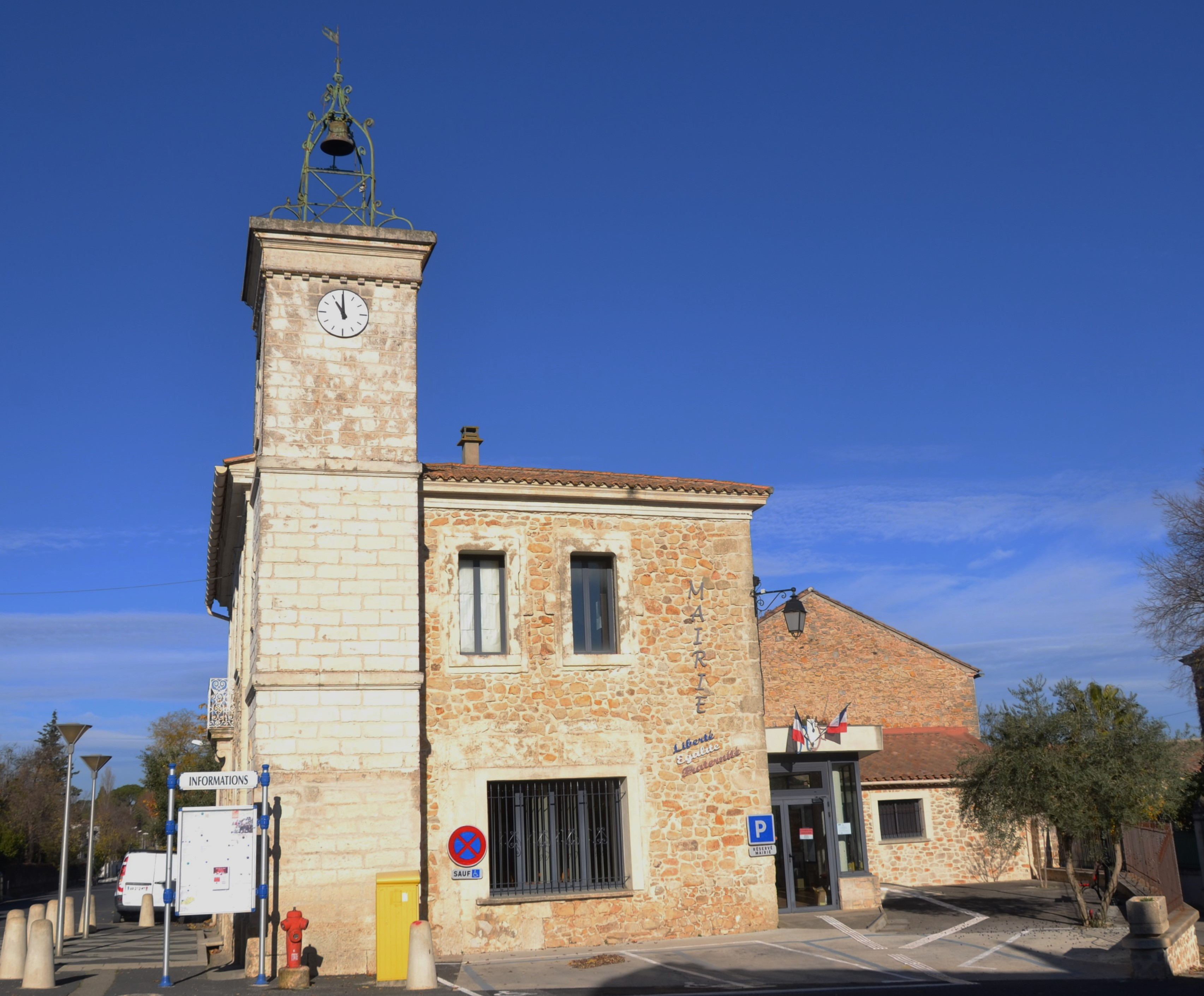 mairie et beffroi à Saint-Sériès